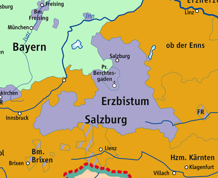 Karte des Fürsterzbistums Salzburg 1789 / Map Archbishopric of Salzburg 1789, Ausschnitt aus